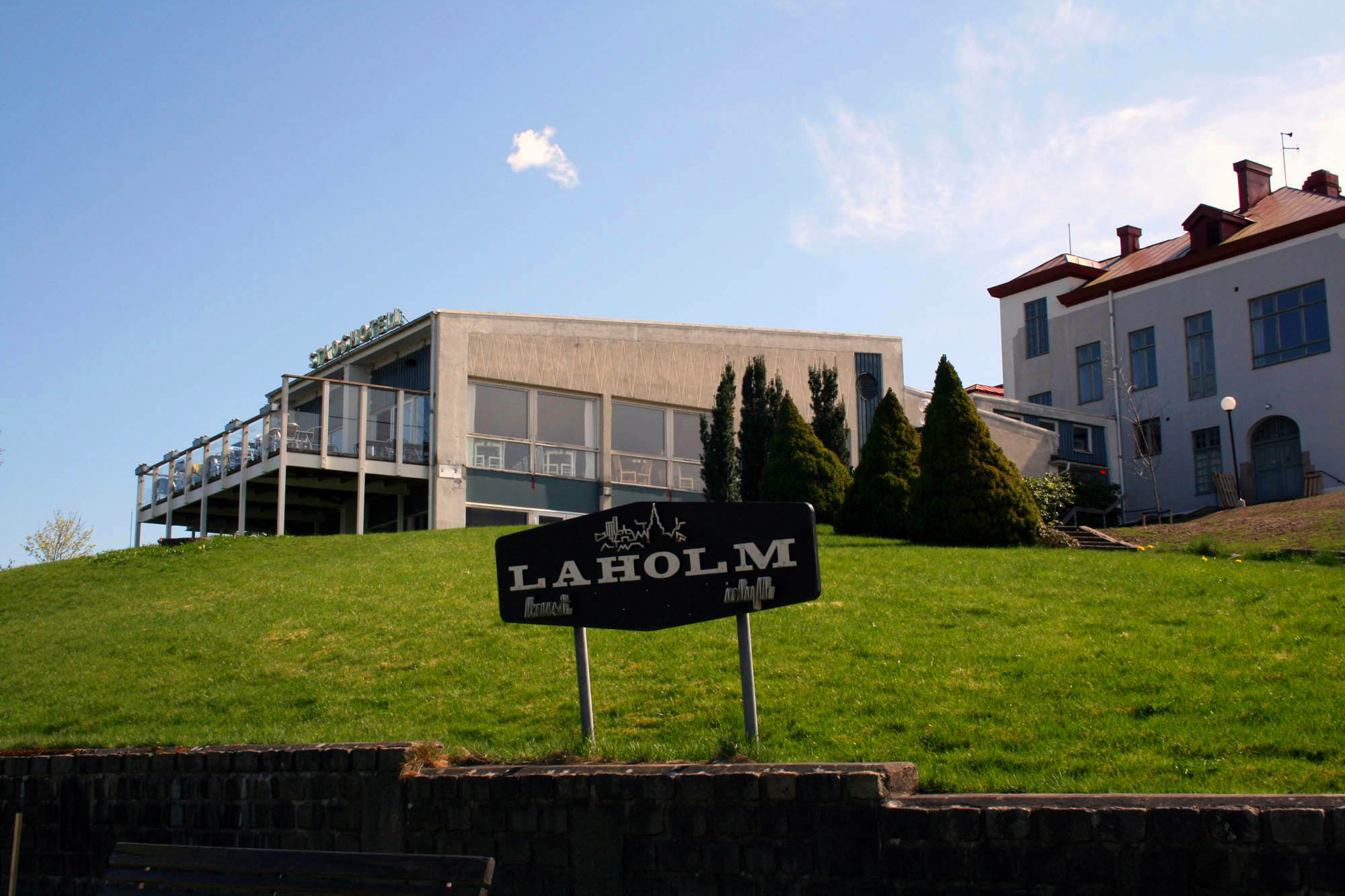 Stadshotellet, Laholm